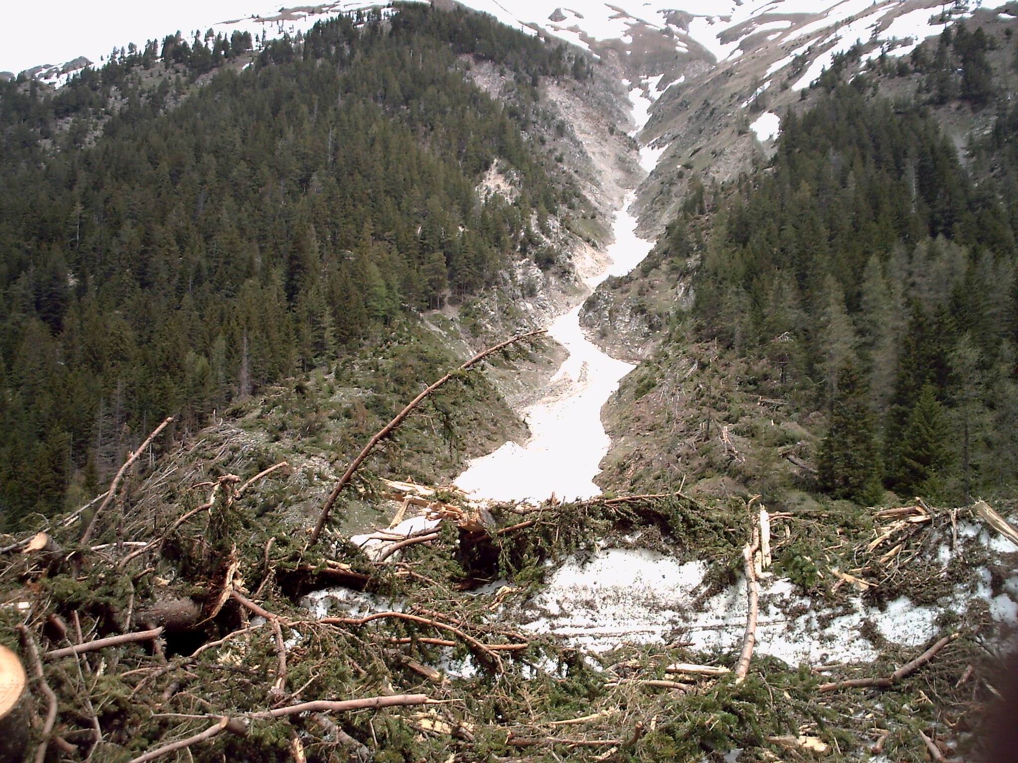 Conséquences d'une avalanche dans une foret du Mercantour